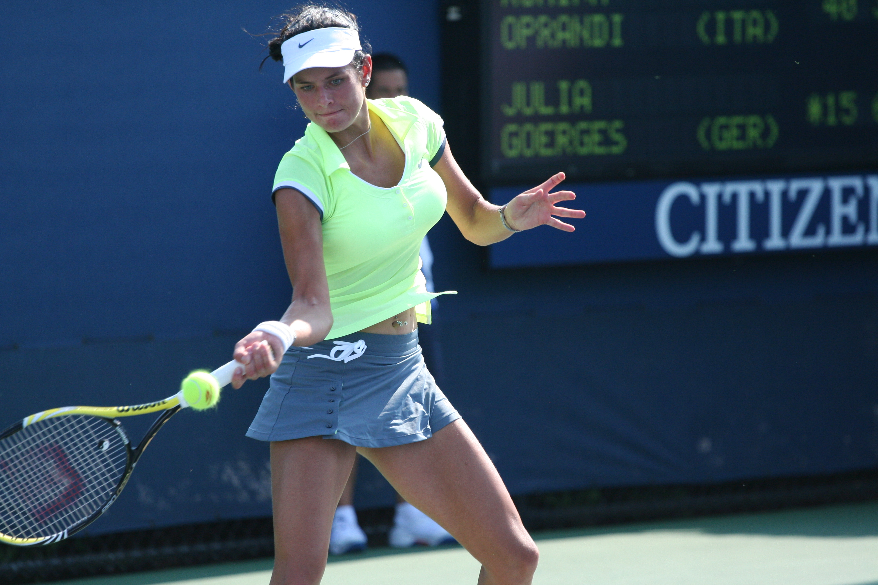 Julia Goerges at U.S. Open, August 31, 2010